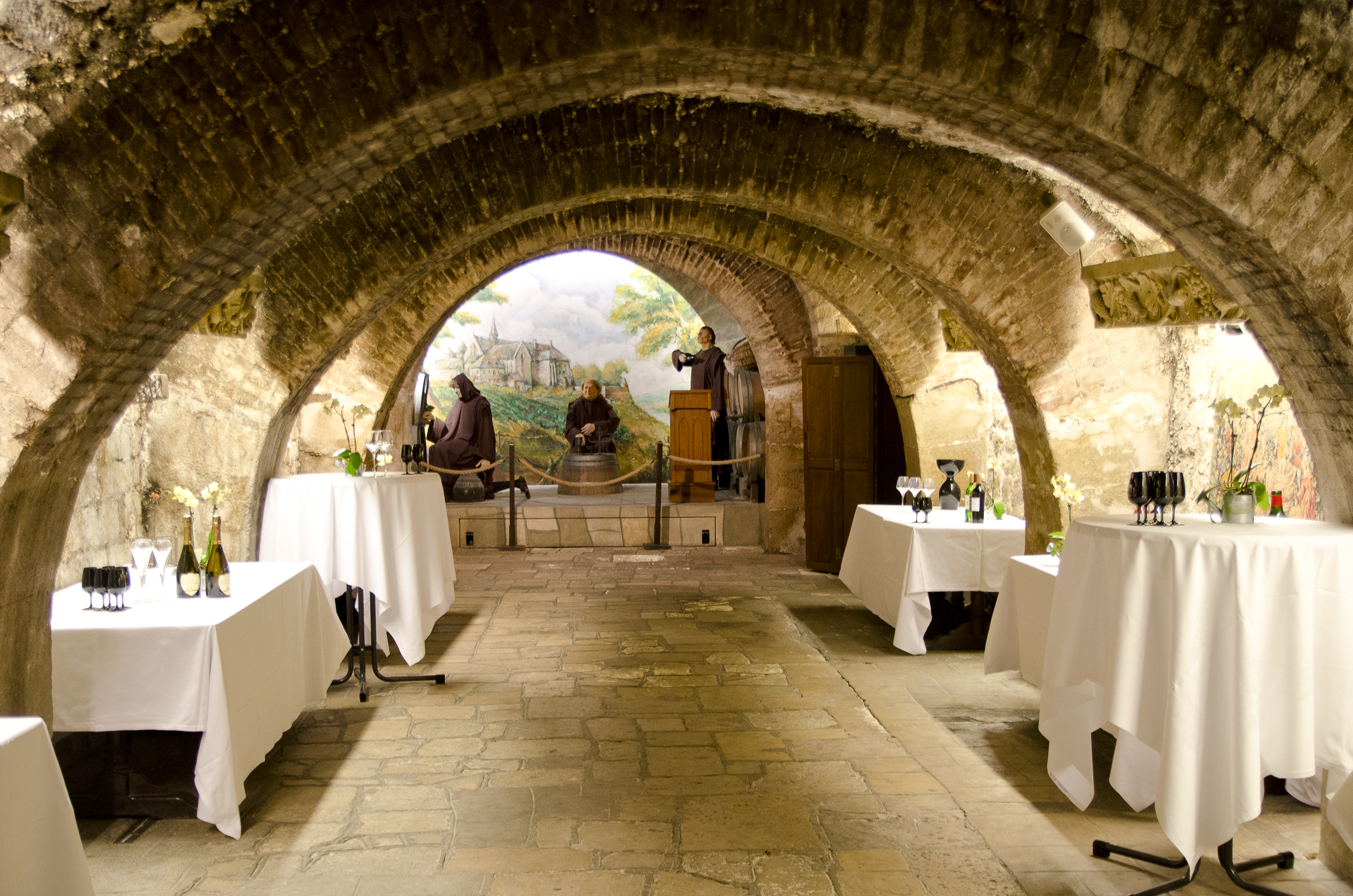 Musée du Vin Paris: vue "soirée"